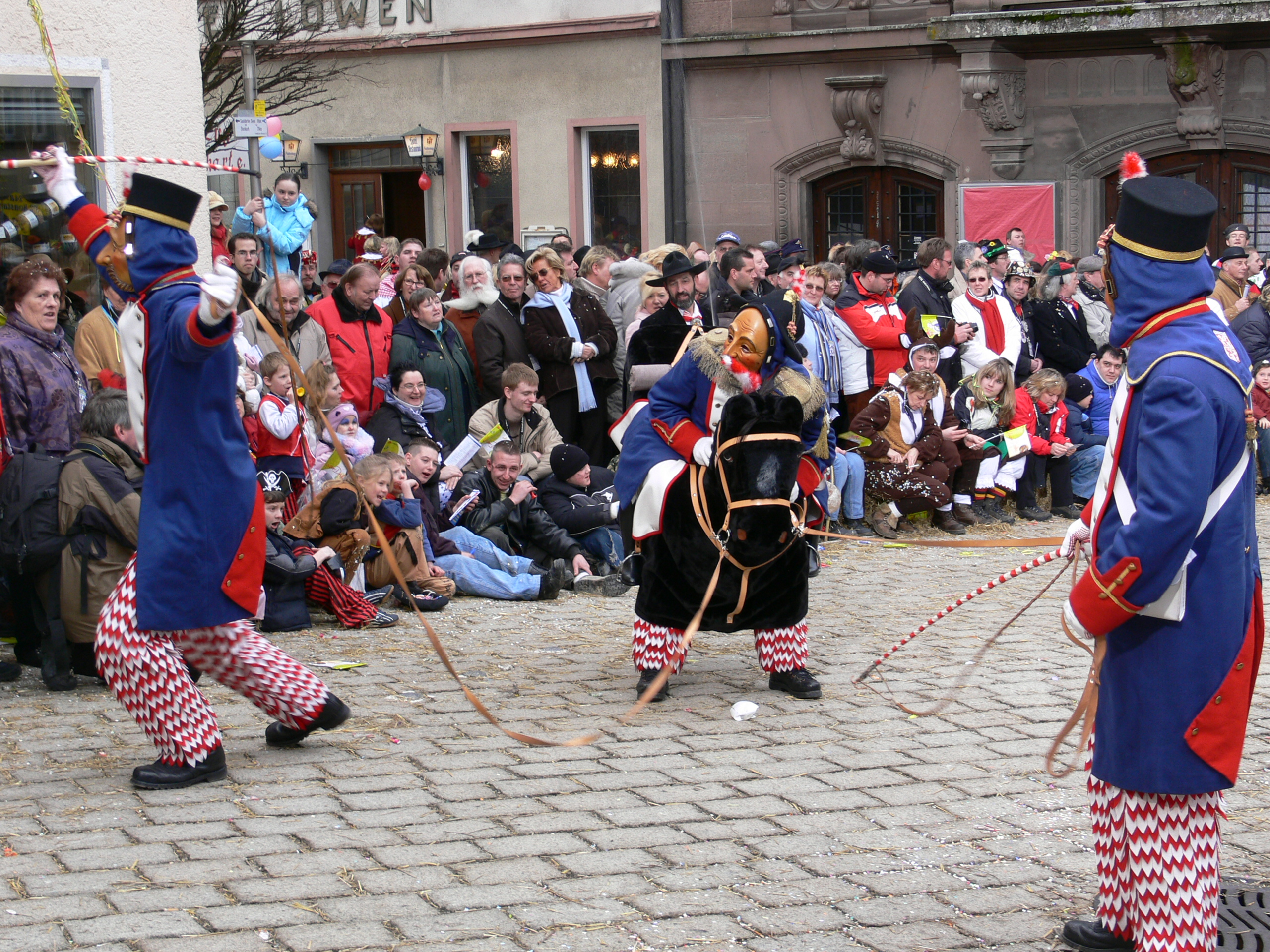 Plätzlerzunft Weingarten, Figur: Fastnetsbutzerössle (Generalsrössle) Veranstaltung: Narrensprung beim Narrentreffen Meßkirch 2006